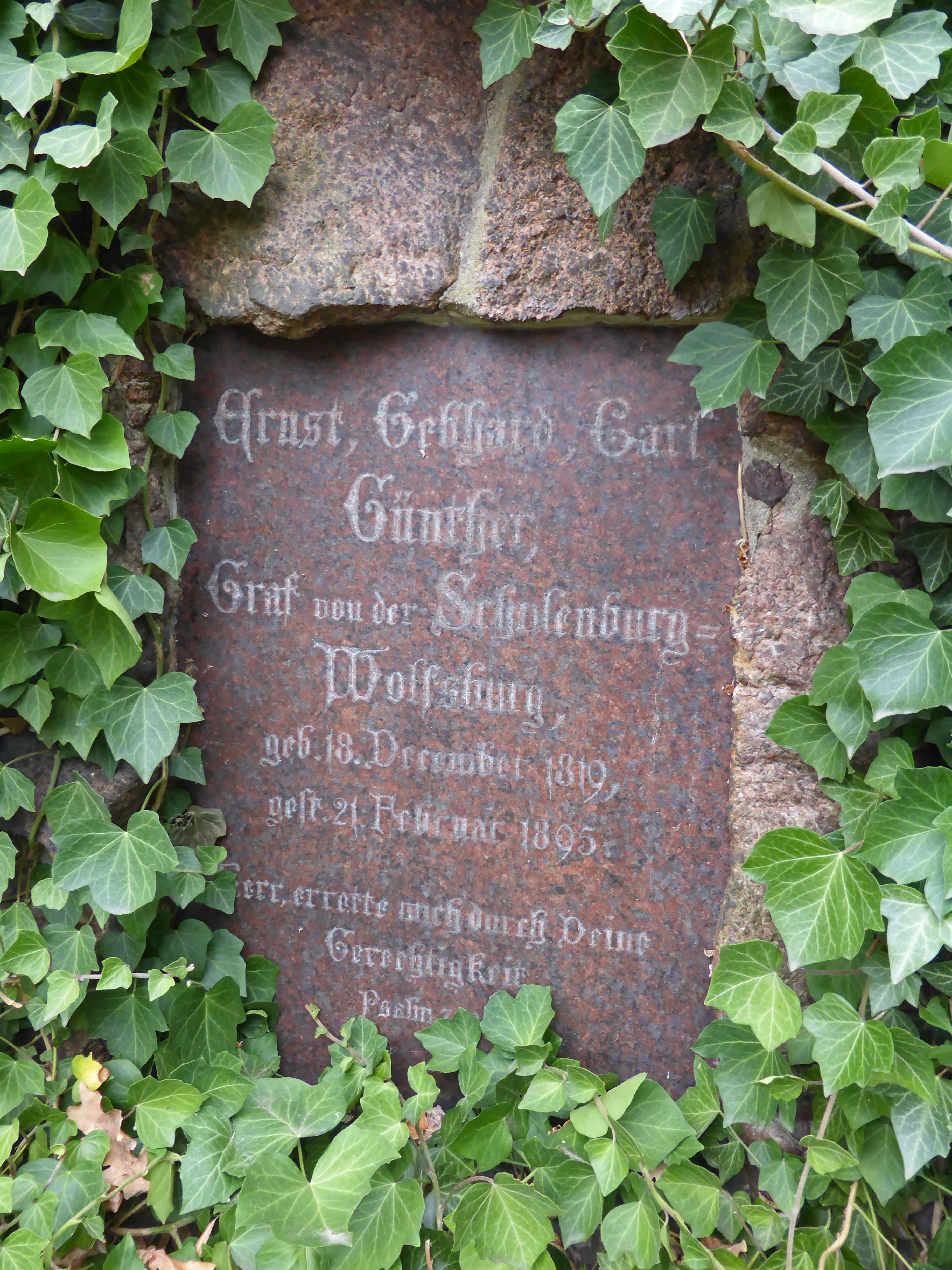 Teilansicht des Grabmals von Ernst Gebhard Carl Günther Schulenburg auf dem Friedhof in Rothenfelde.